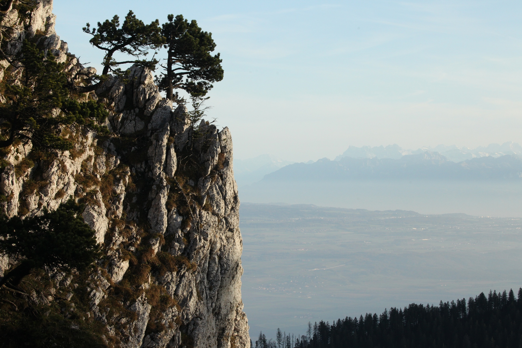 Pin à crochet sur la crête des aiguilles de Baulmes